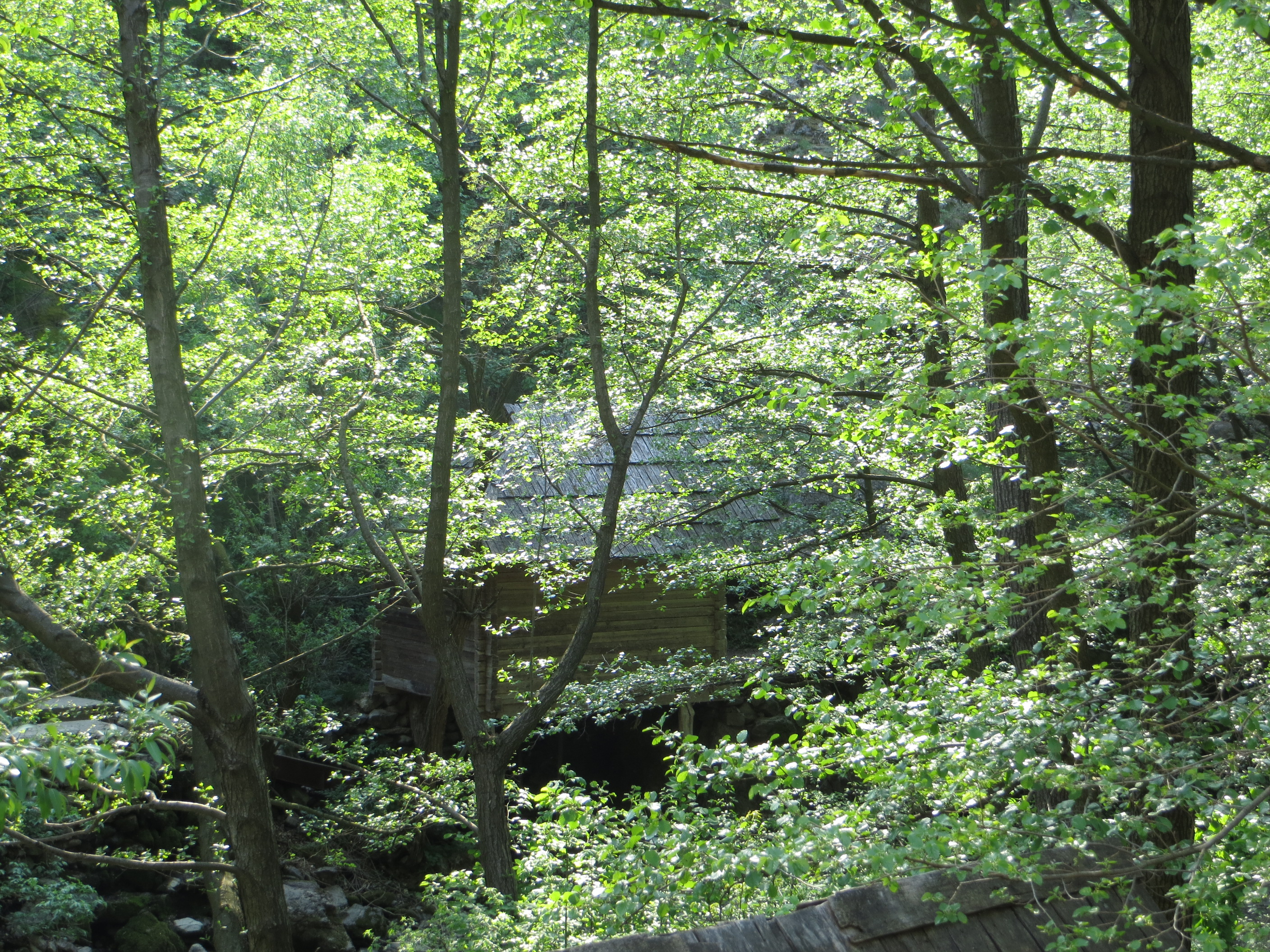 Ansamblul de mori din Eftimie Murgu - moară necunoscută